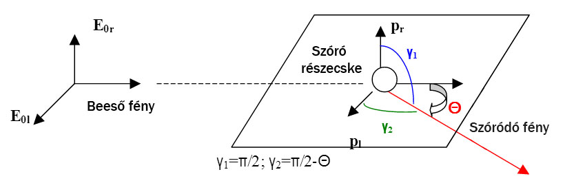 DLS szórás